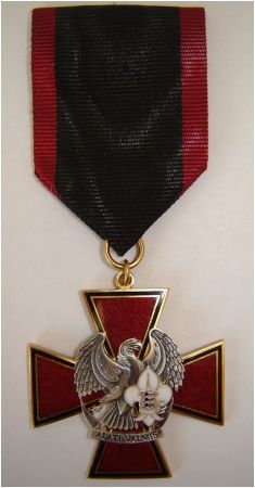 Noorte Kotkaste Tallinna maleva teeneterist